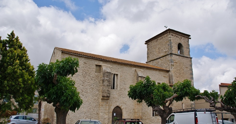 Ancienne église Saint Marcel.